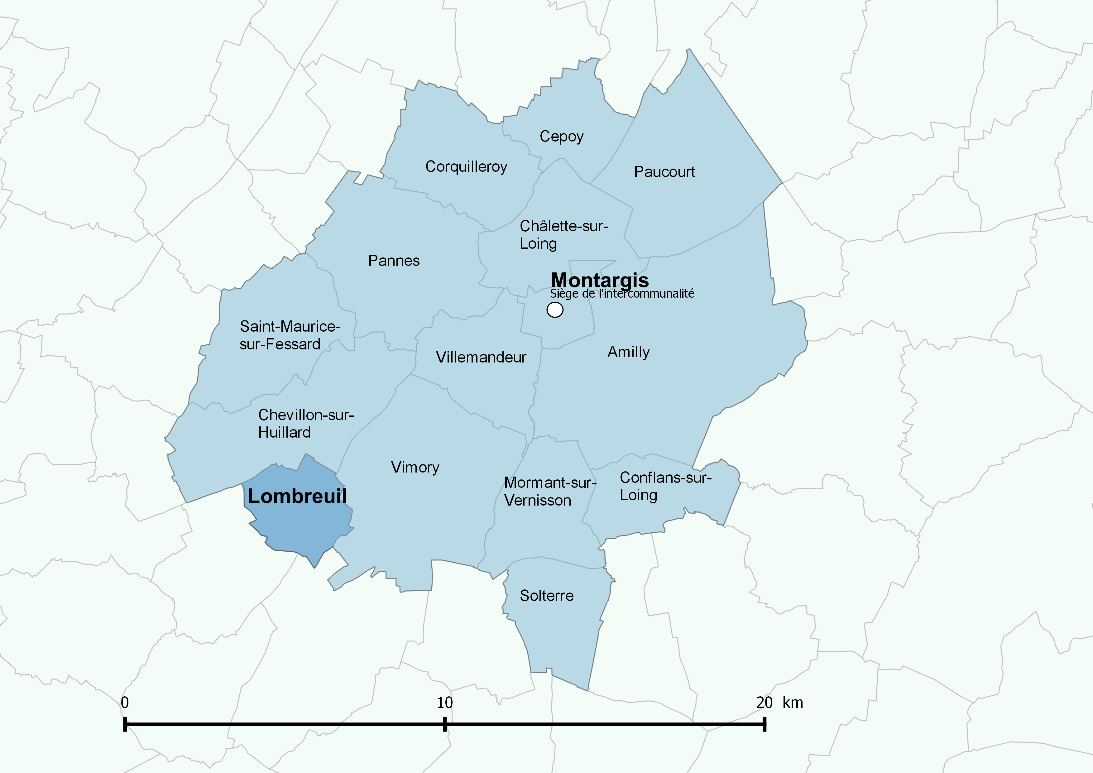 Périmètre de l'Agglomération montargoise et rives du Loing - Positionnement de la commune de Lombreuil